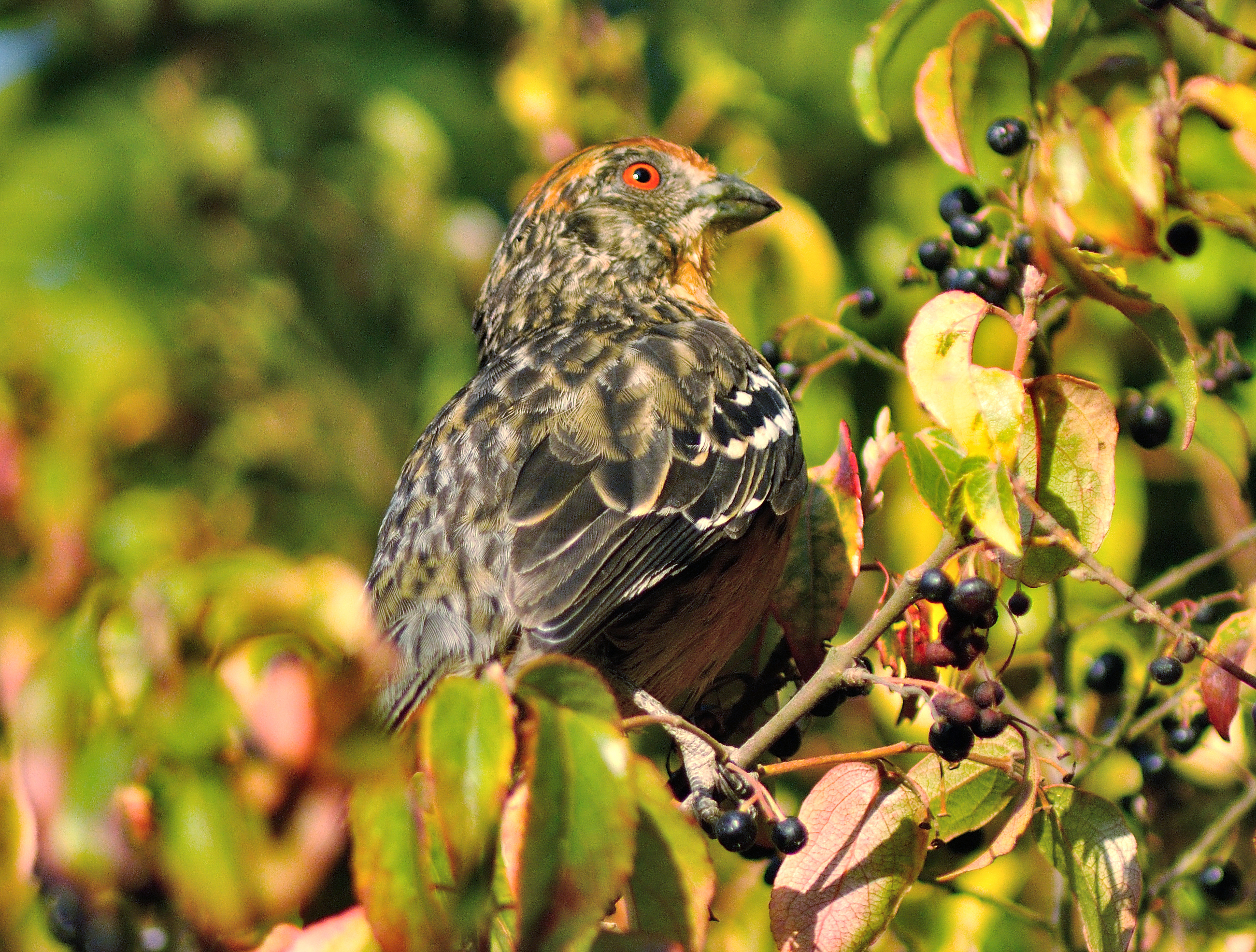 Rara Macho, Chiguayante Febrero 2012